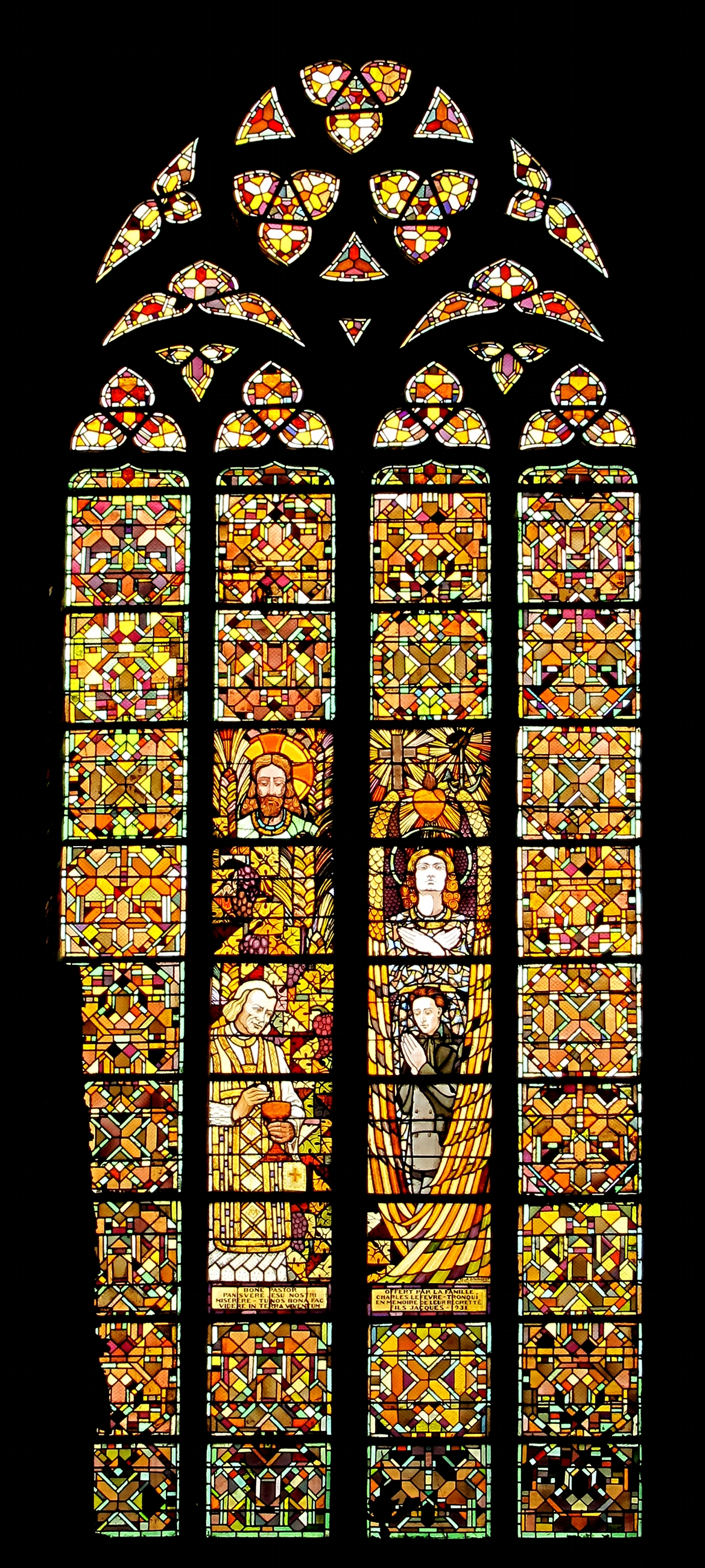 Vitrail art-déco de la basilique Saint Quentin de Saint-Quentin (Aisne).